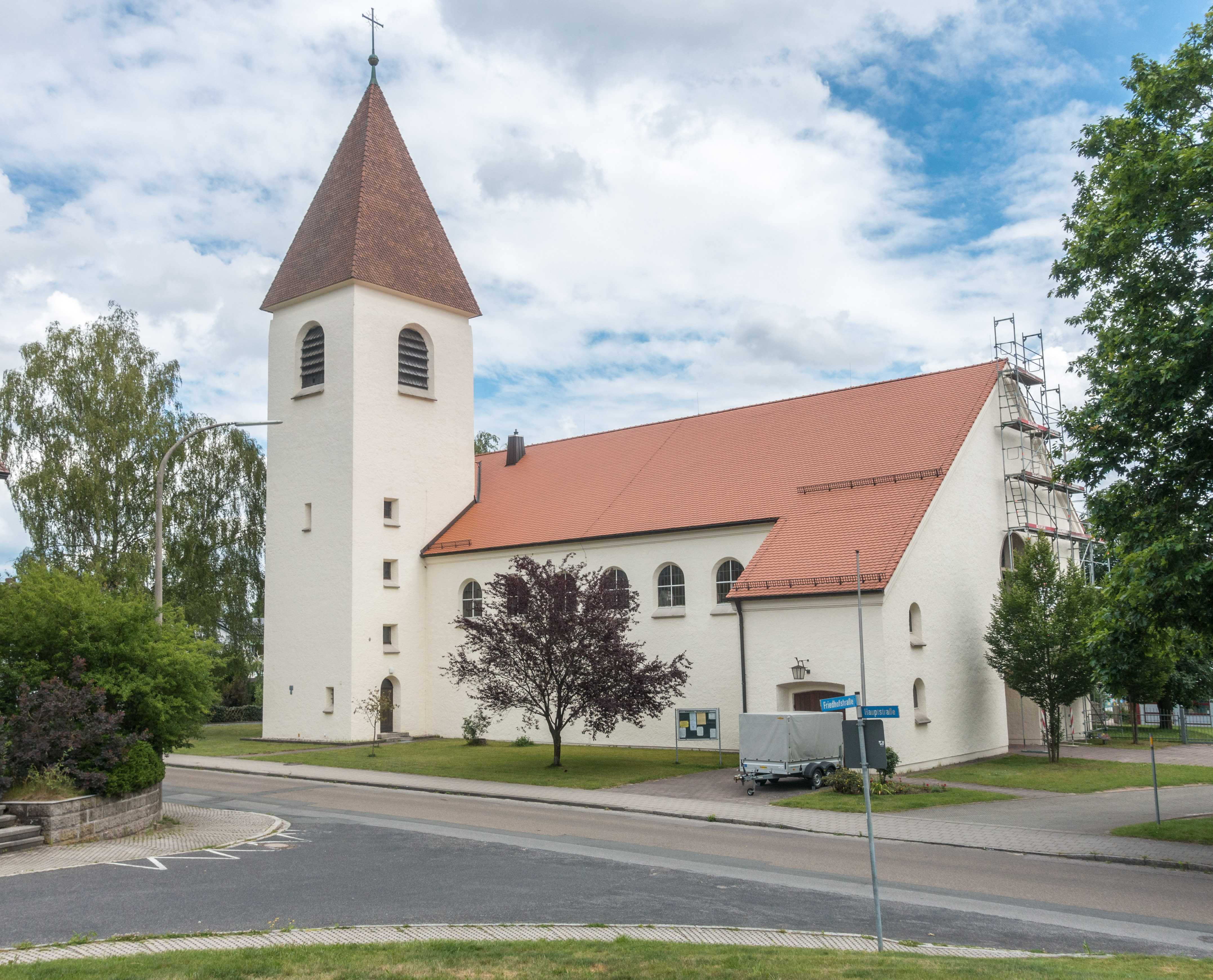 Kirche, St. Josef, Schwarzenbruck